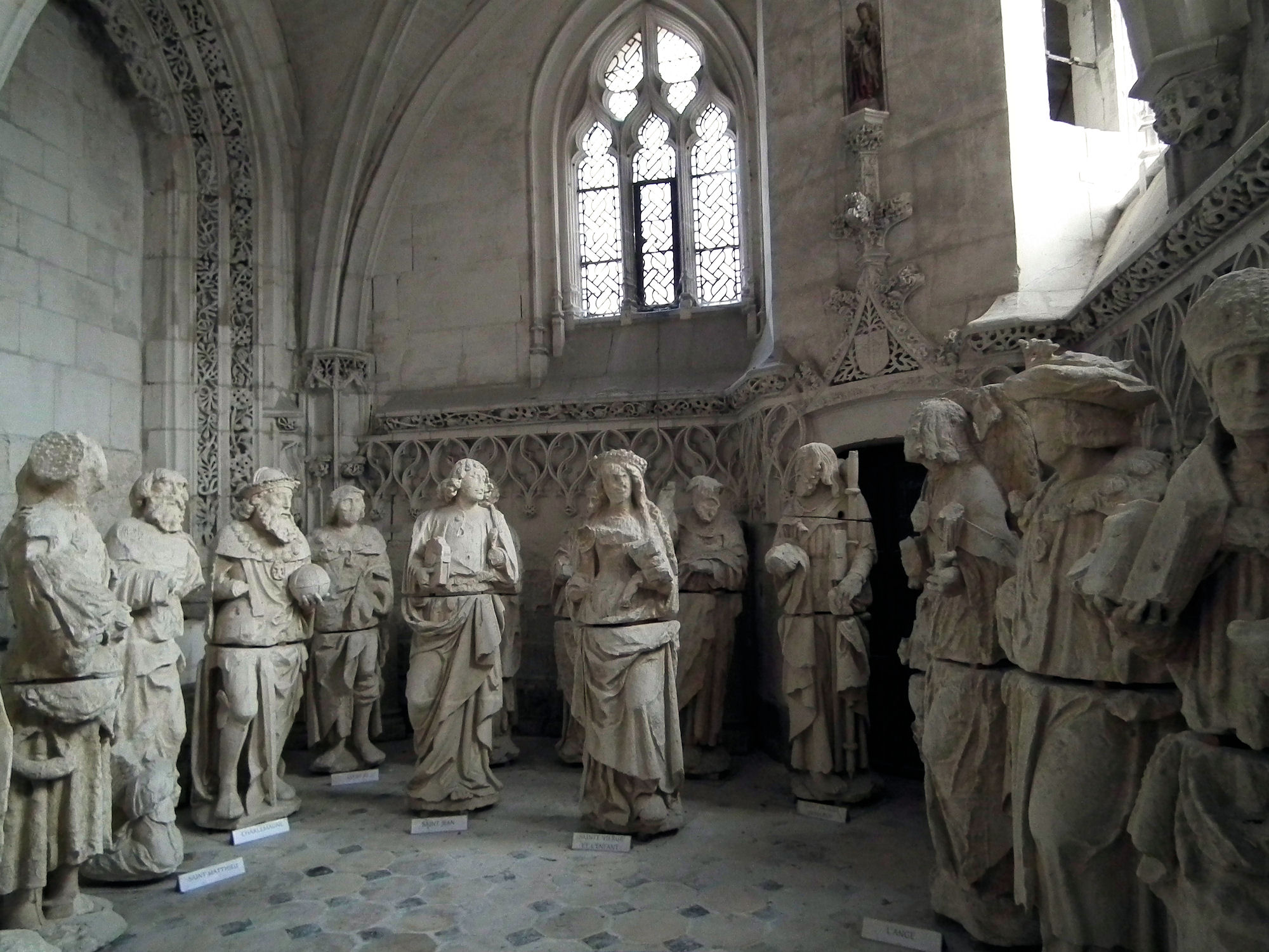 Chapelle du Saint-Esprit, Rue, France. Saint Mathieu, saint Jean, Charlemagne, une vierge à l'enfant...